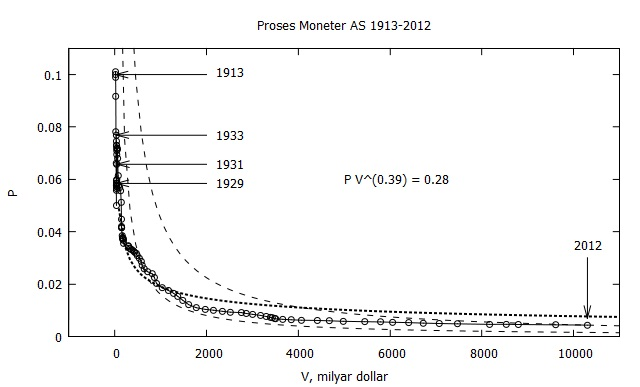 Proses moneter di USA 1913-2012.